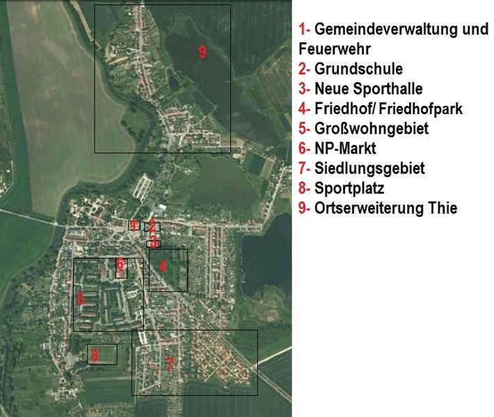 Chematischer Aufbau Löderburgers